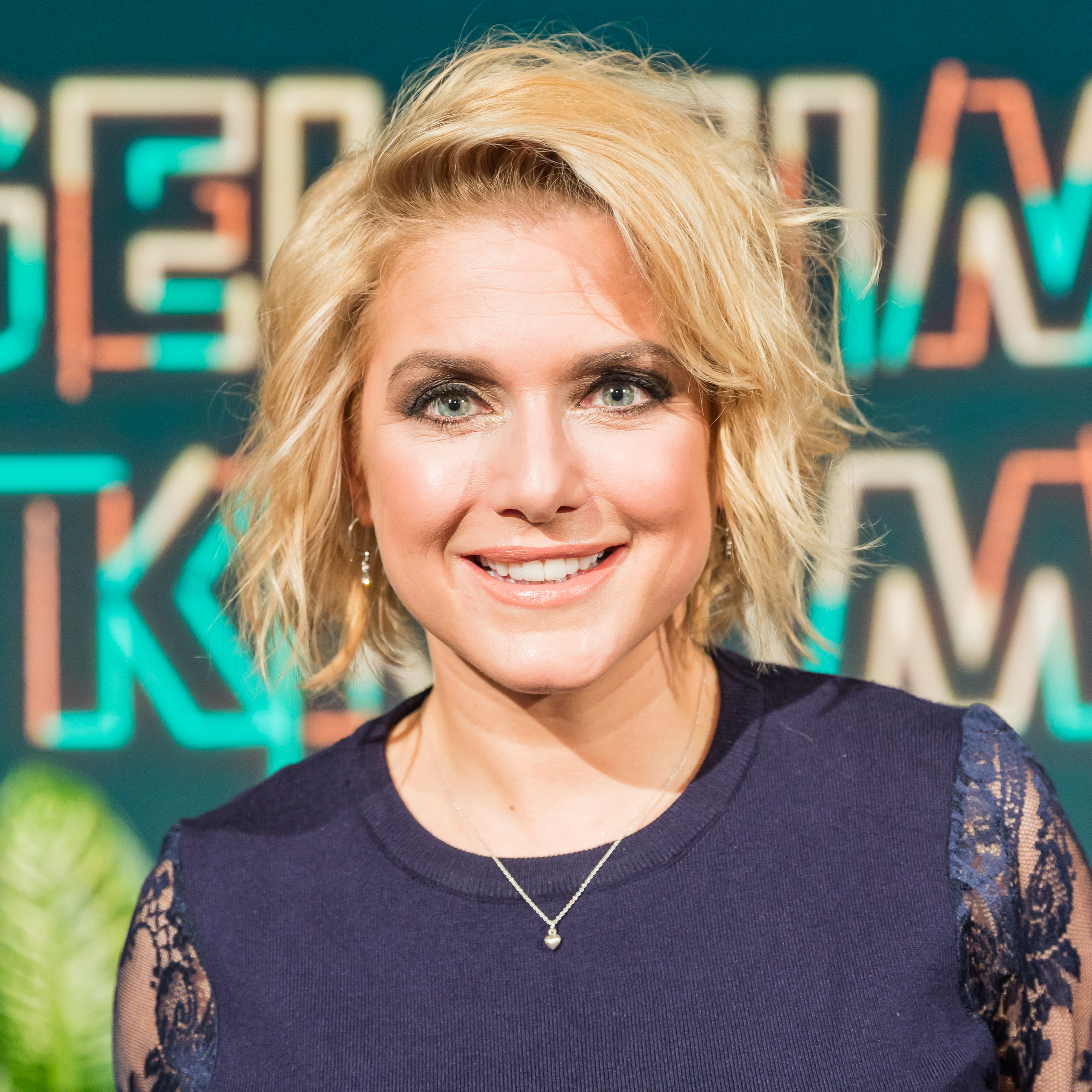 „Geheimniskrämer“ mit Martin Klempnow und seinen Gästen. Aufzeichnung des Westdeutschen Rundfunks im Studio Köln-Bocklemünd vom 23. Januar 2018 Foto: Jeanette Biedermann